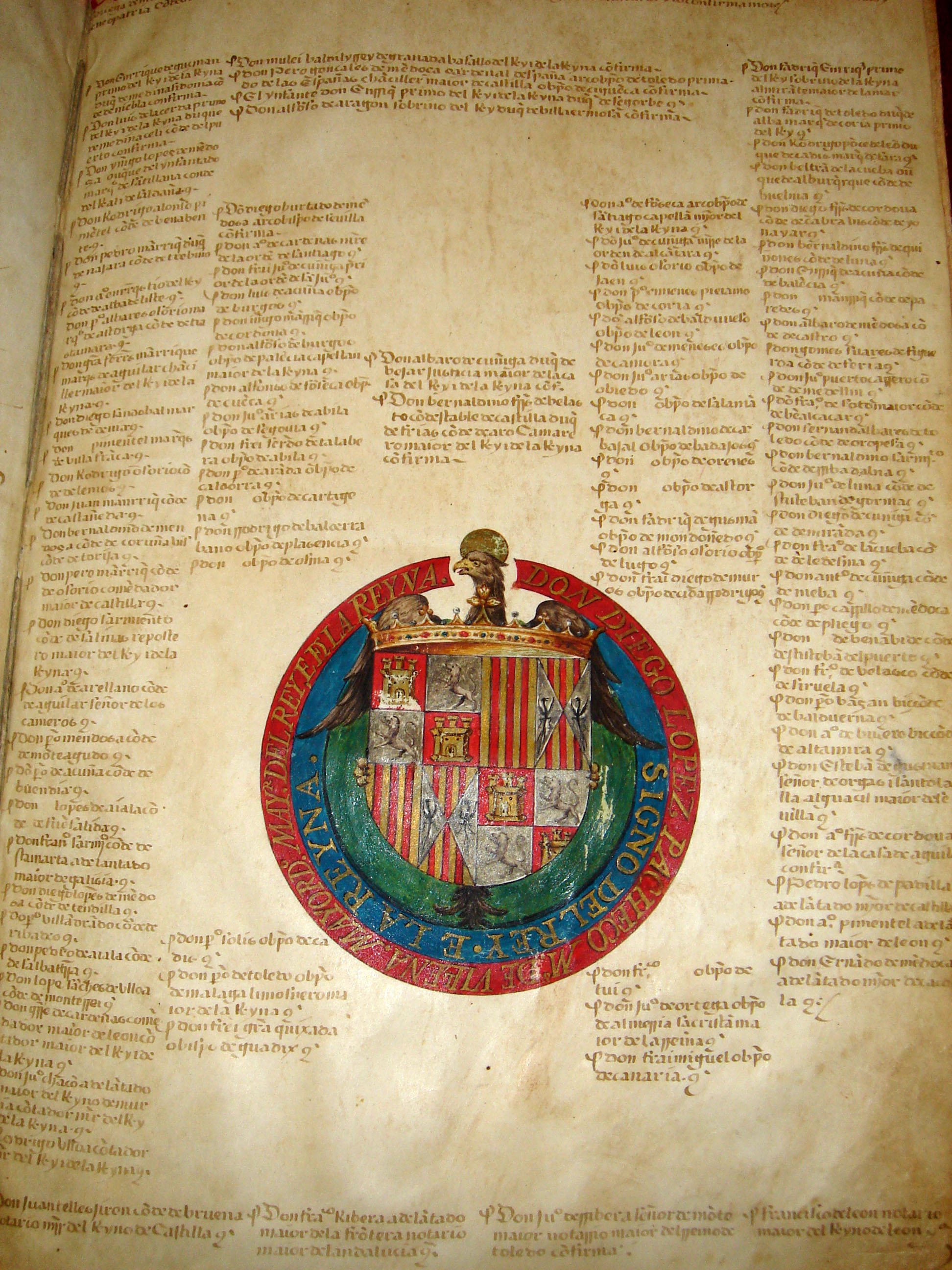 Privilegios de 1491 con emblema de los Reyes Católicos para el Solar de Tejada concedidos por los Reyes Católicos.